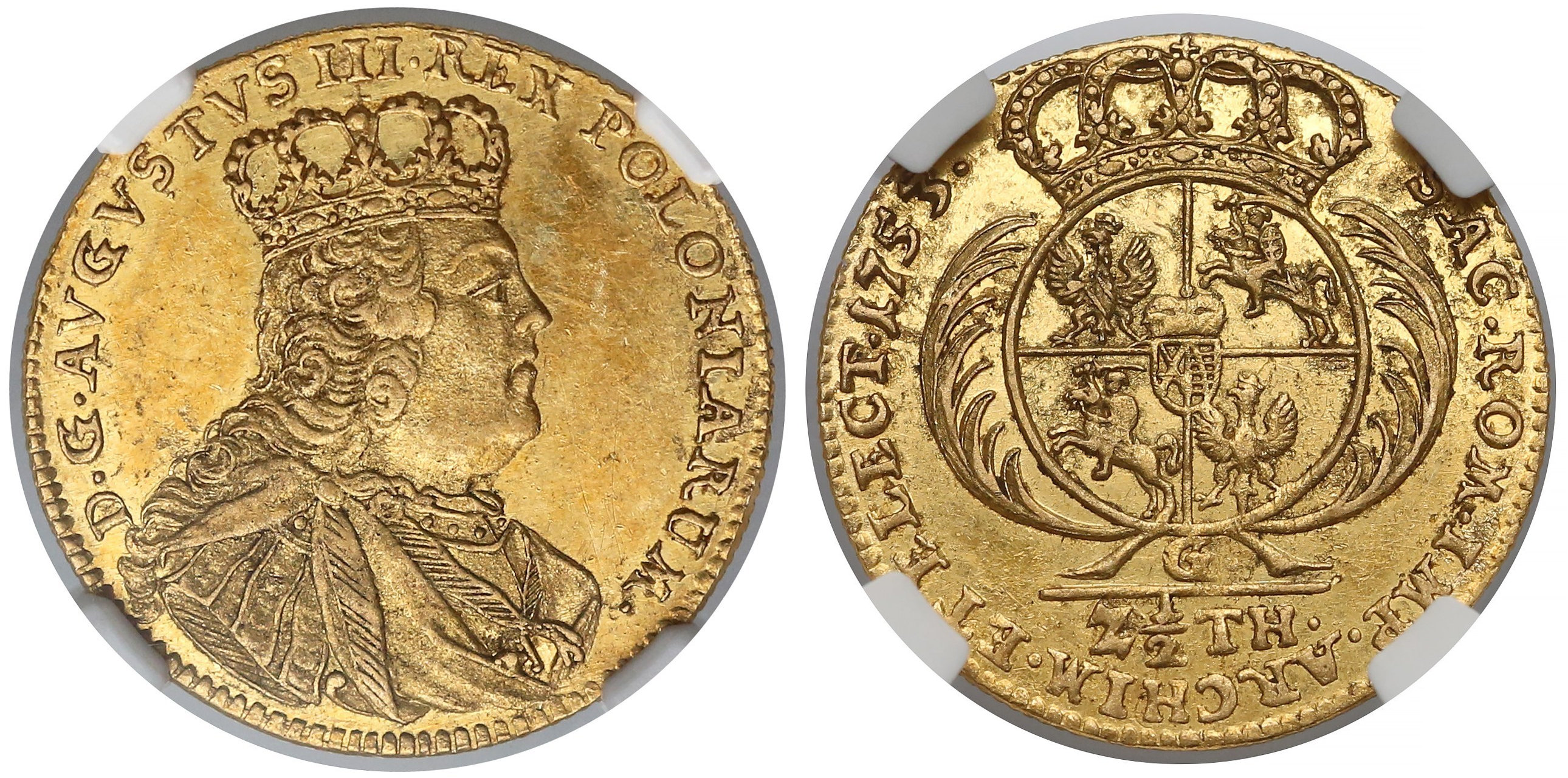 Dwu i półdukat 1753 Lipsk